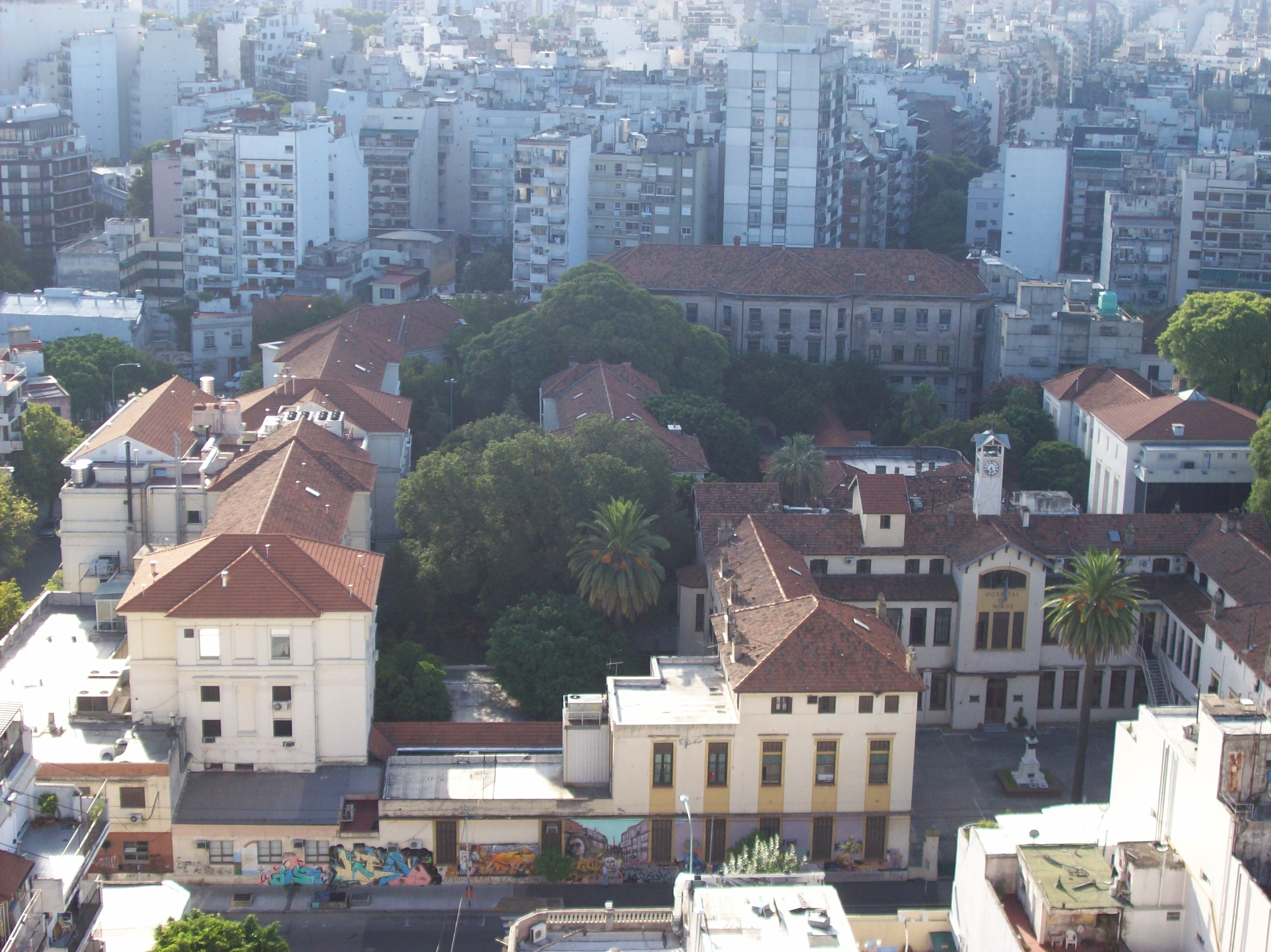 Hospital de Niños Dr. Ricardo Gutiérrez en Buenos Aires, Argentina.